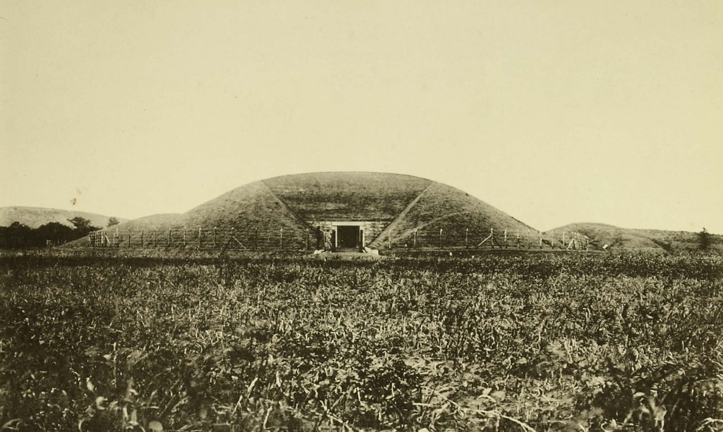 강서대묘 입구 文言: 江西大墓 入歐